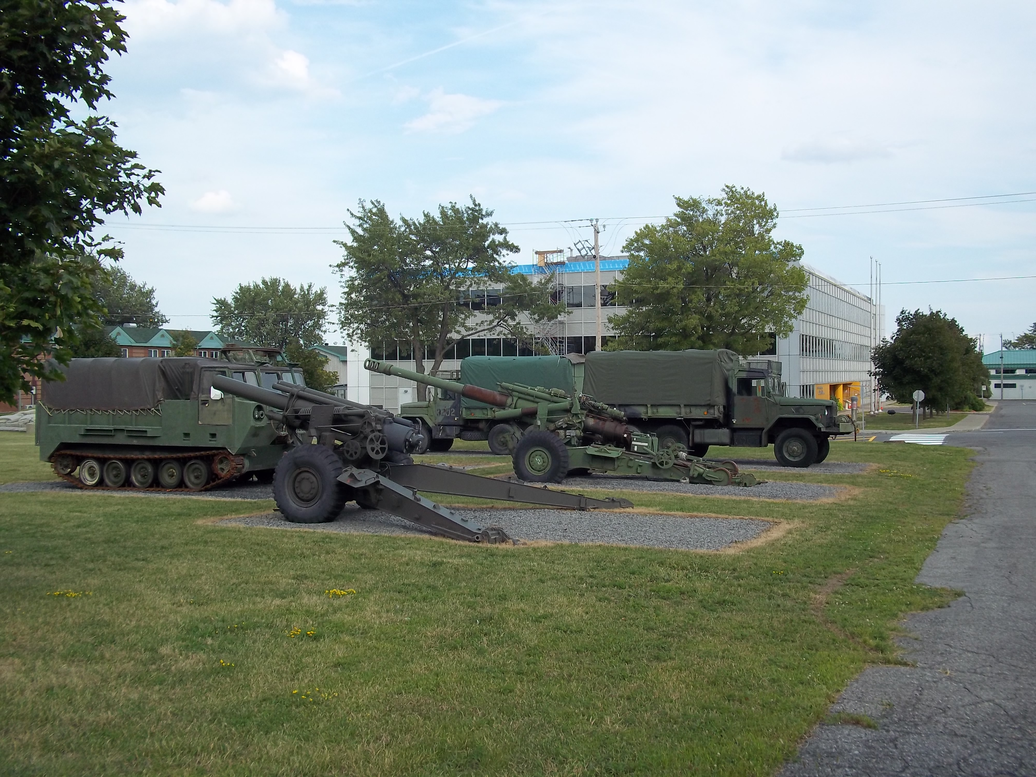 Garnison Longue-Pointe, boulevard Langelier, Montréal